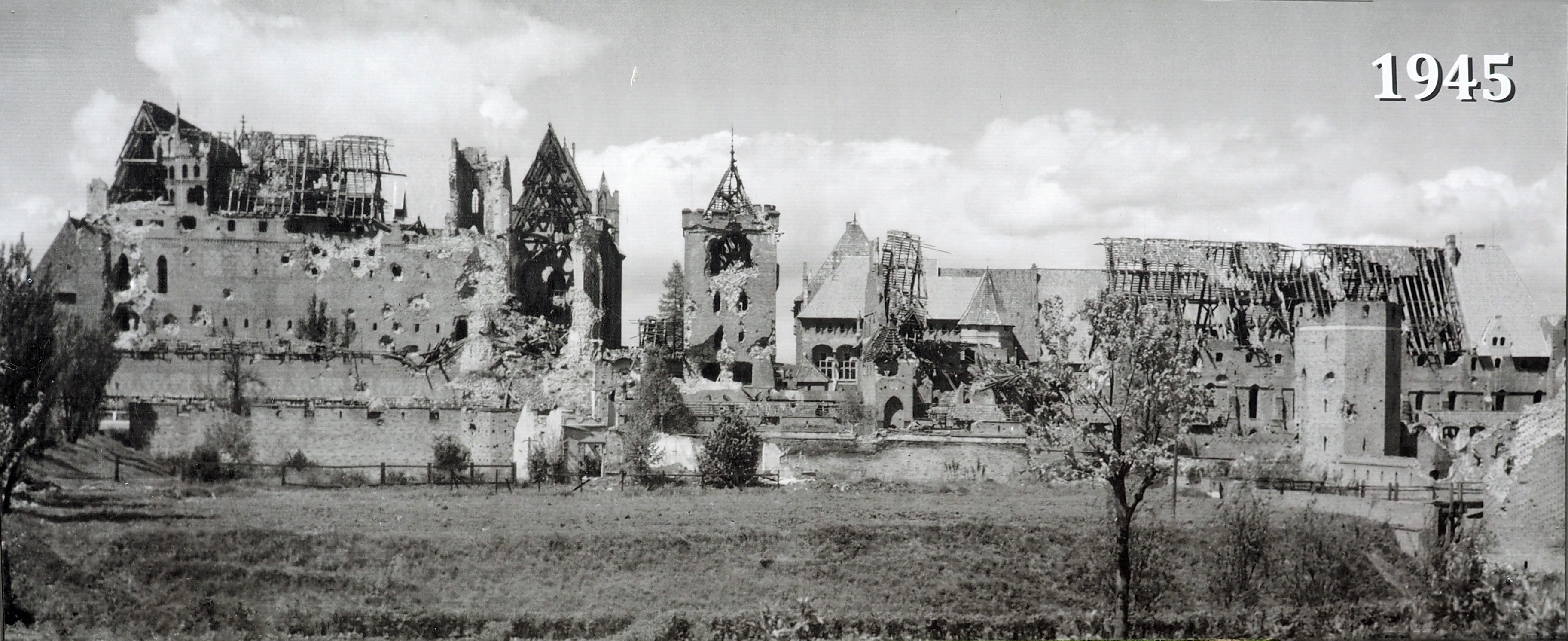 Marienburg nach der Zerstörung 1945 - öffentliches Plakat